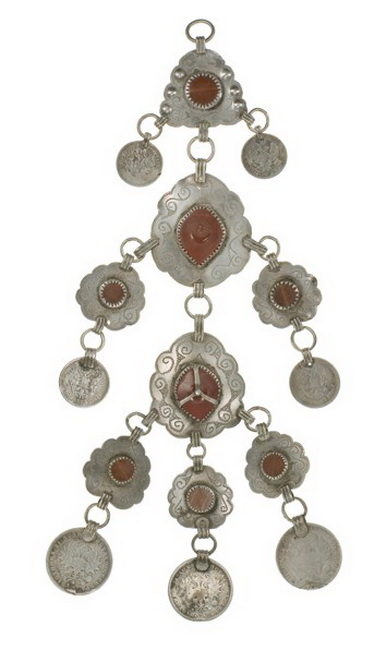 Шолпы